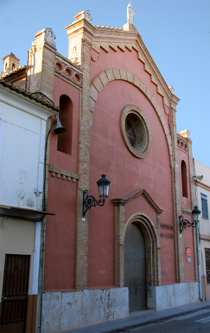 Iglesia parroquial de Nuestra Señora de los Desamparados y San Isidro, Valencia, Spain.